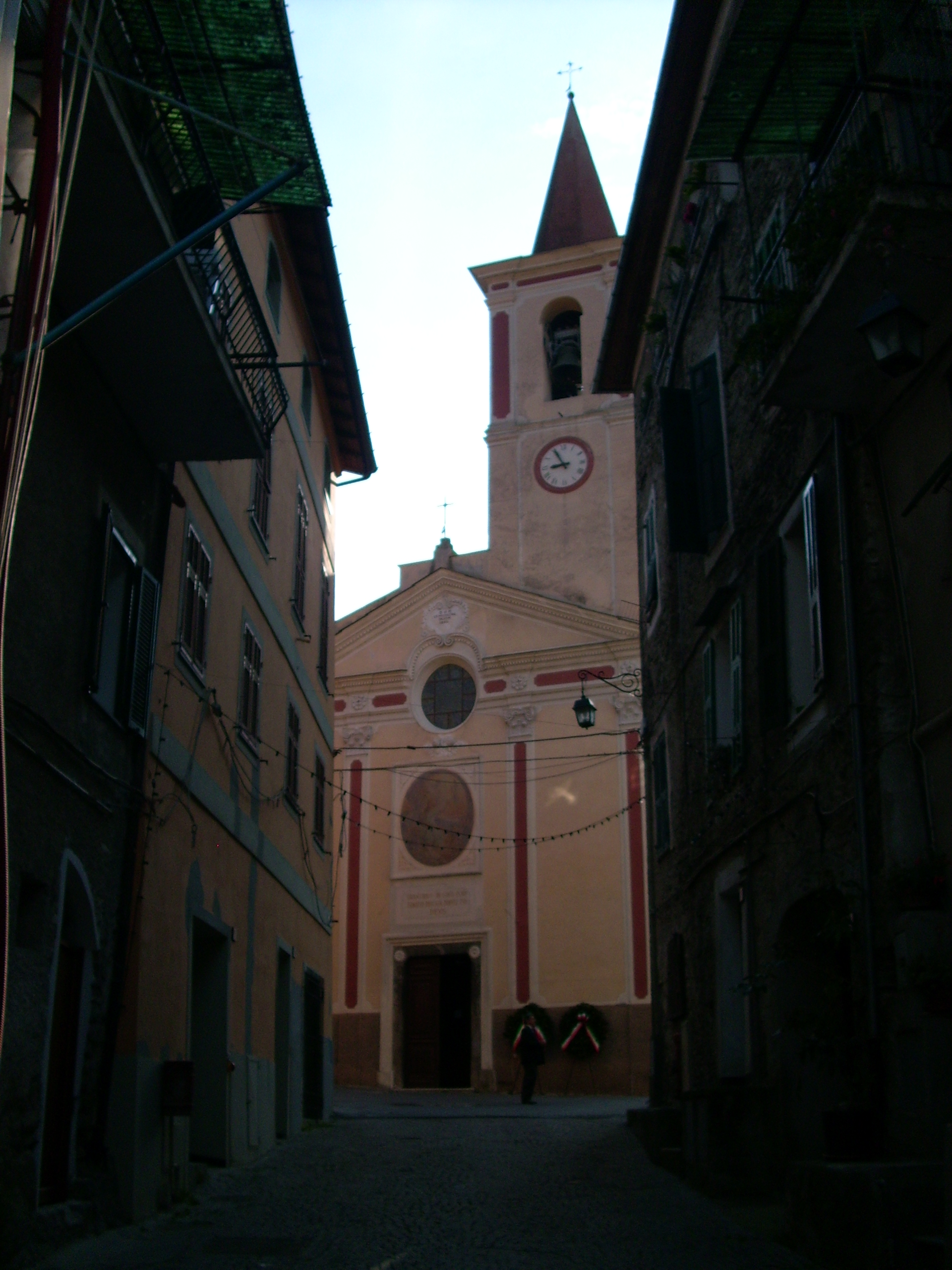 Chiesa di Santa Maria Maddalena di Isolabona, Liguria, Italia